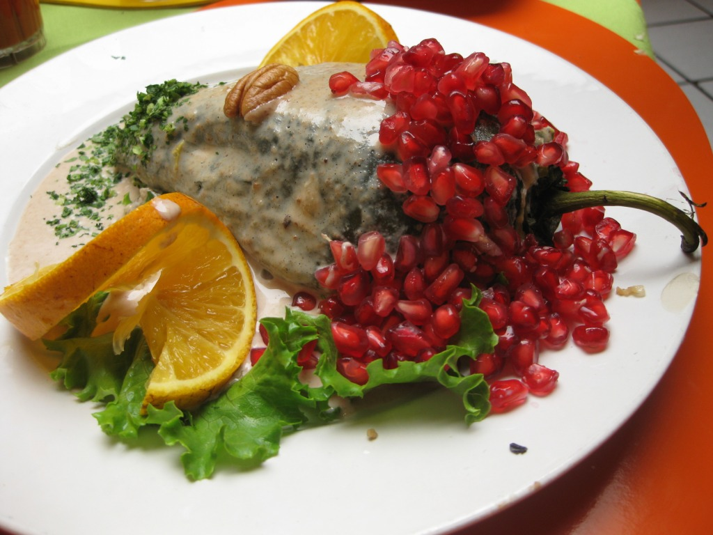 Vegetarian Chiles en Nogada